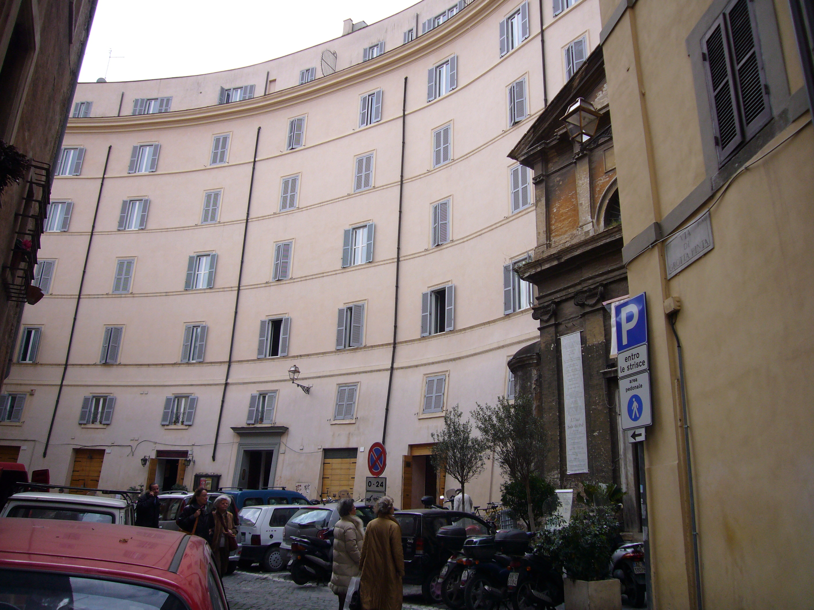 Roma, via di Grottapinta: case costruite sulla cavea del Teatro di Pompeo